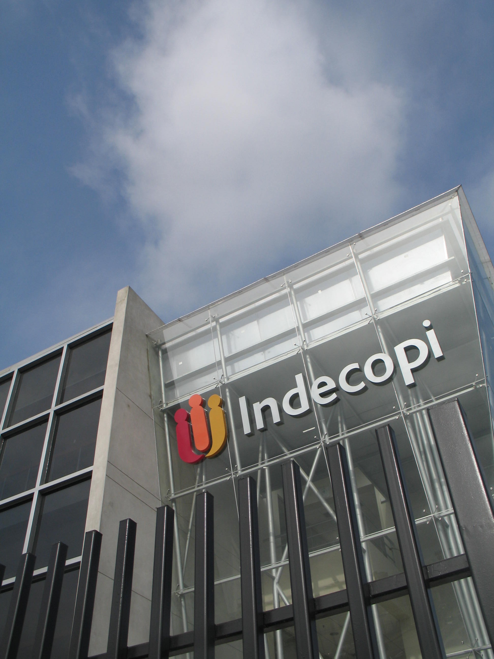 Fachada del Instituto Nacional de Defensa de la Competencia y de la Protección de la Propiedad Intelectual (Indecopi) del Perú.